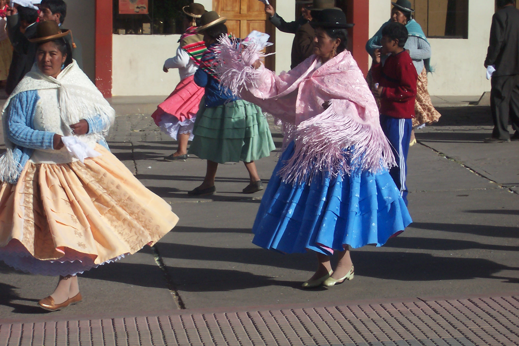 Chucuito, Puno, Perú. Baile popular en la plaza del pueblo durante un casamiento